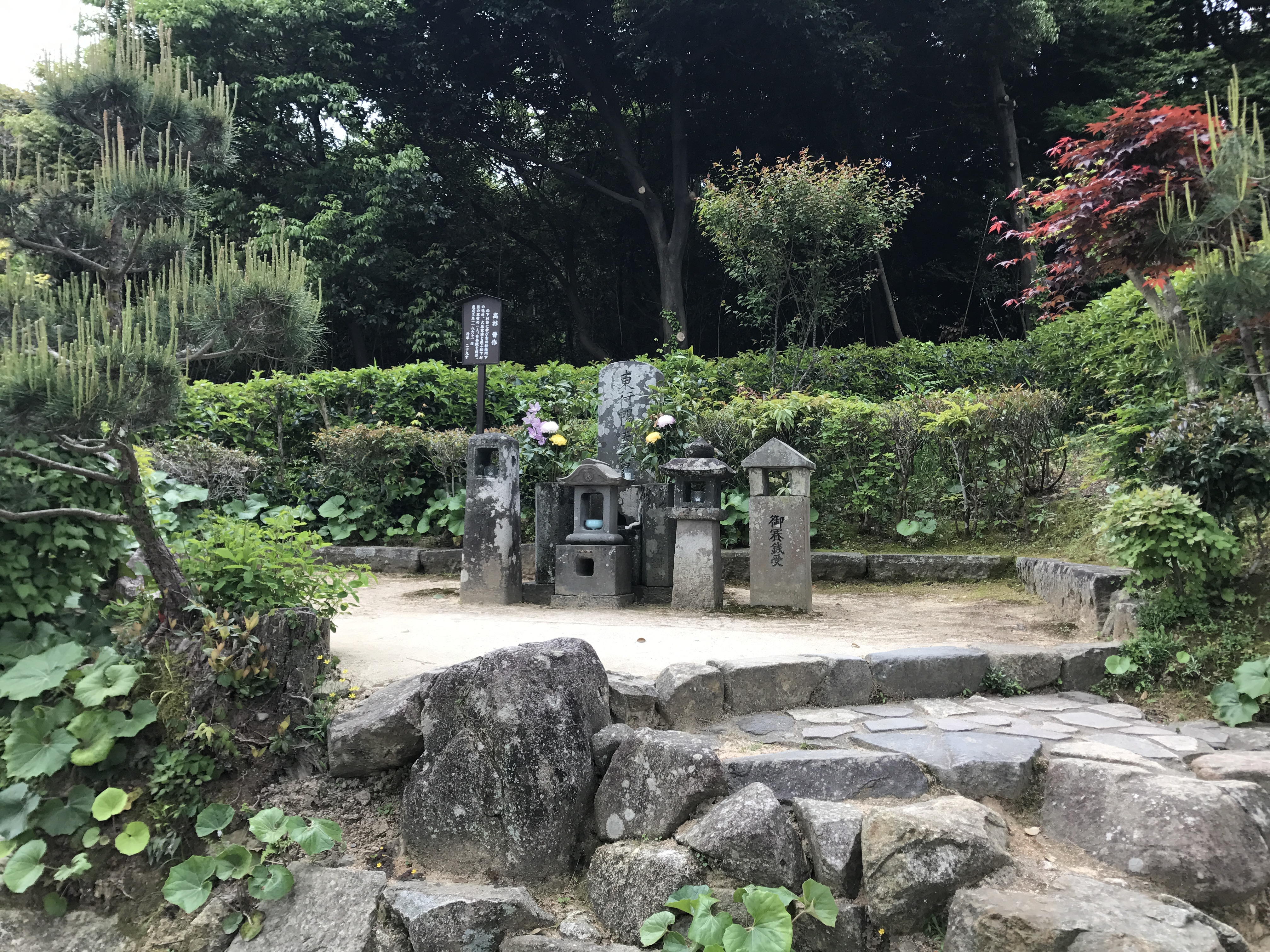 高杉晋作の墓